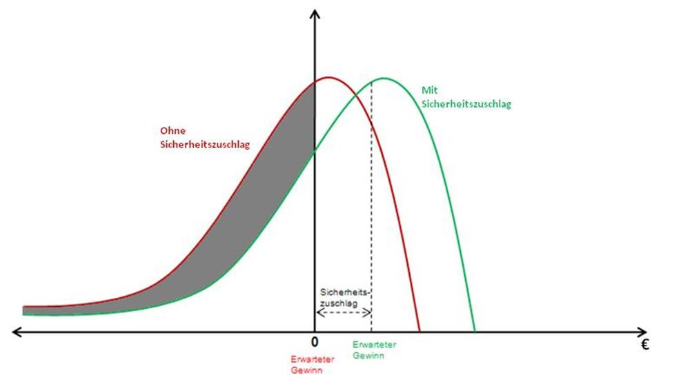 Die Grafik erläutert den Grund für die EInberechnung eines Sicherheitszuschlags